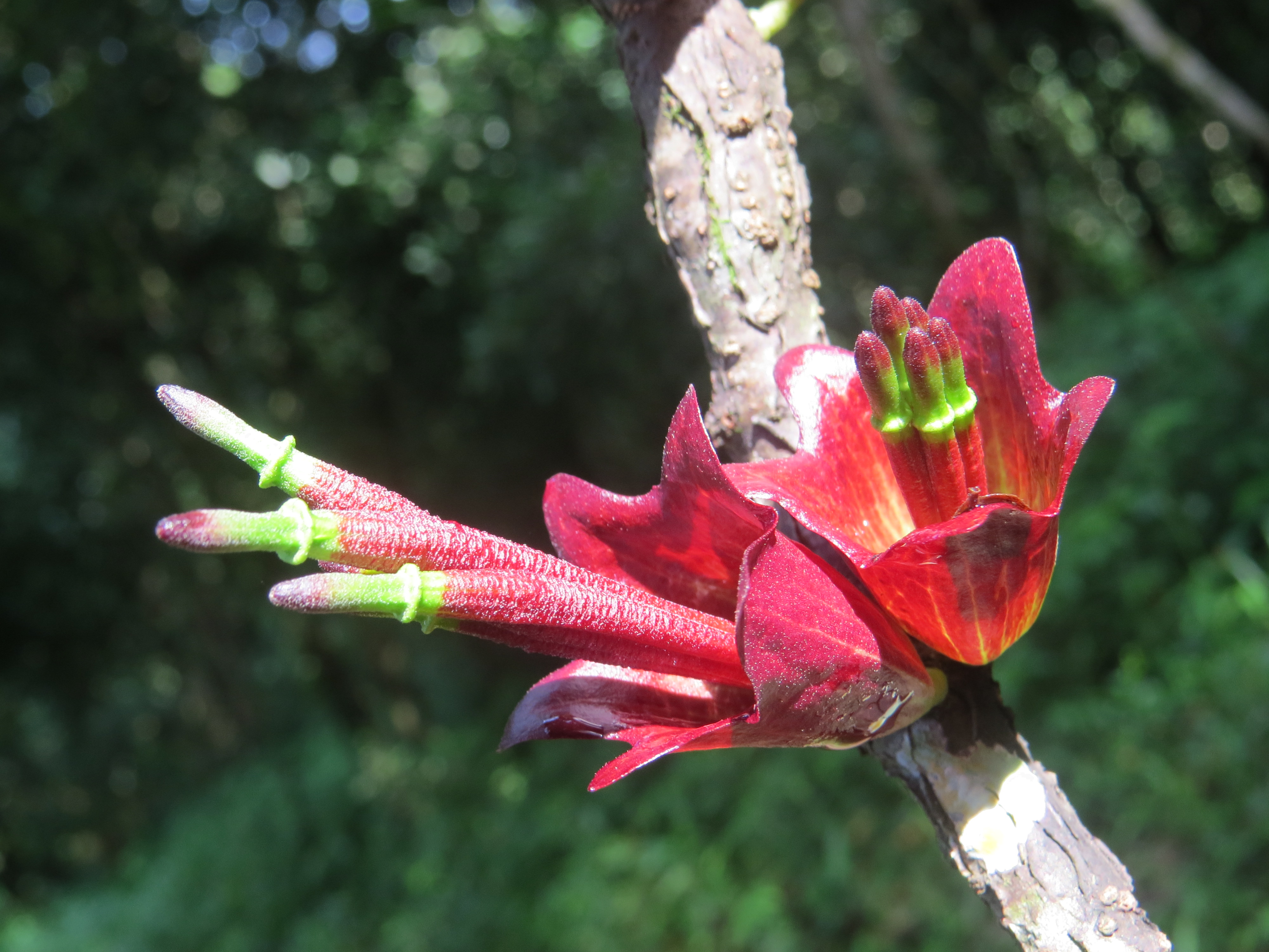 Miscellaneous Photos